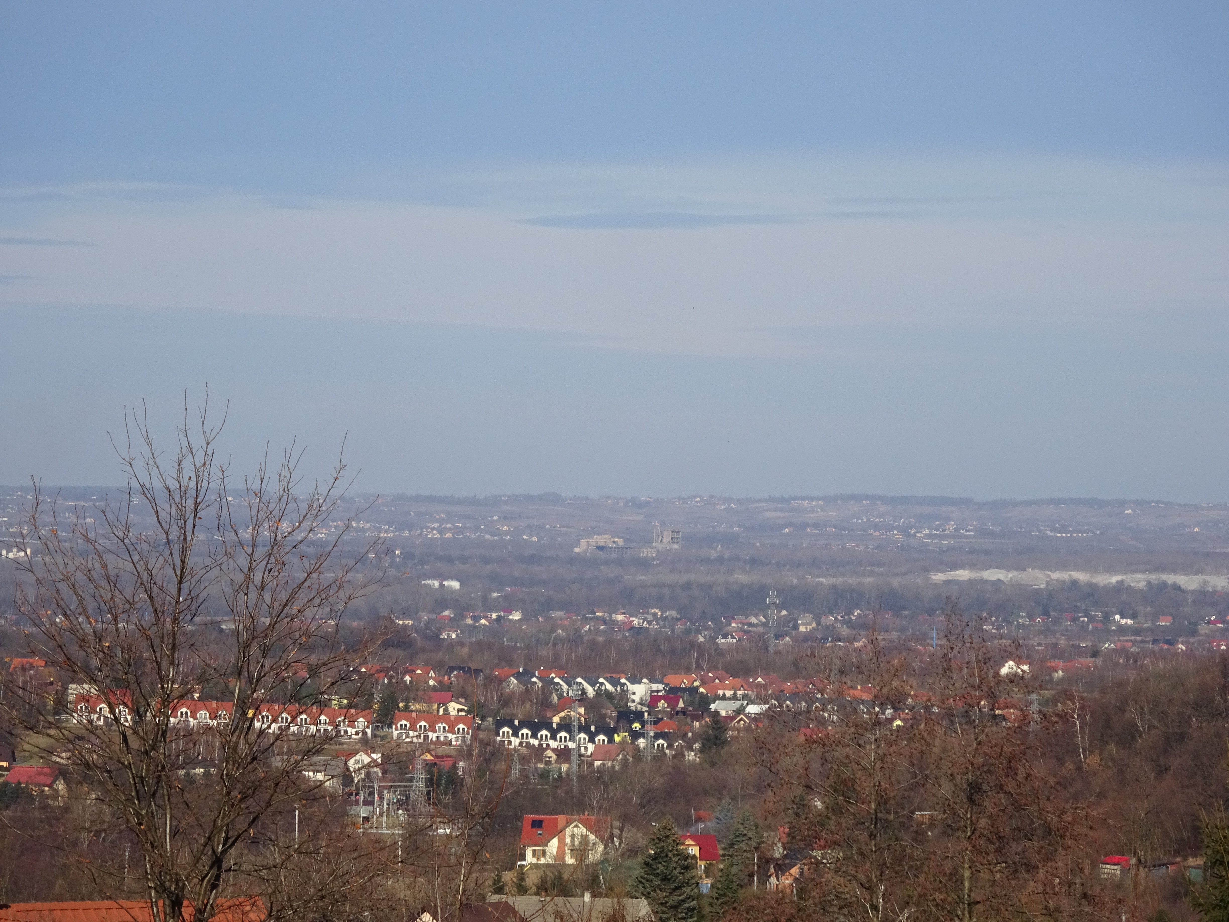 Widok na wieś Tomaszkowice pod Wieliczką w Województwie Małopolskim.